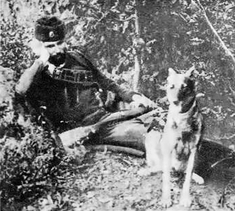 Kosta Pećanac in 1916-1918